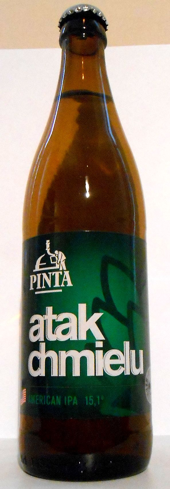 Piwo Atak Chmielu z browaru kontraktowego "Pinta"